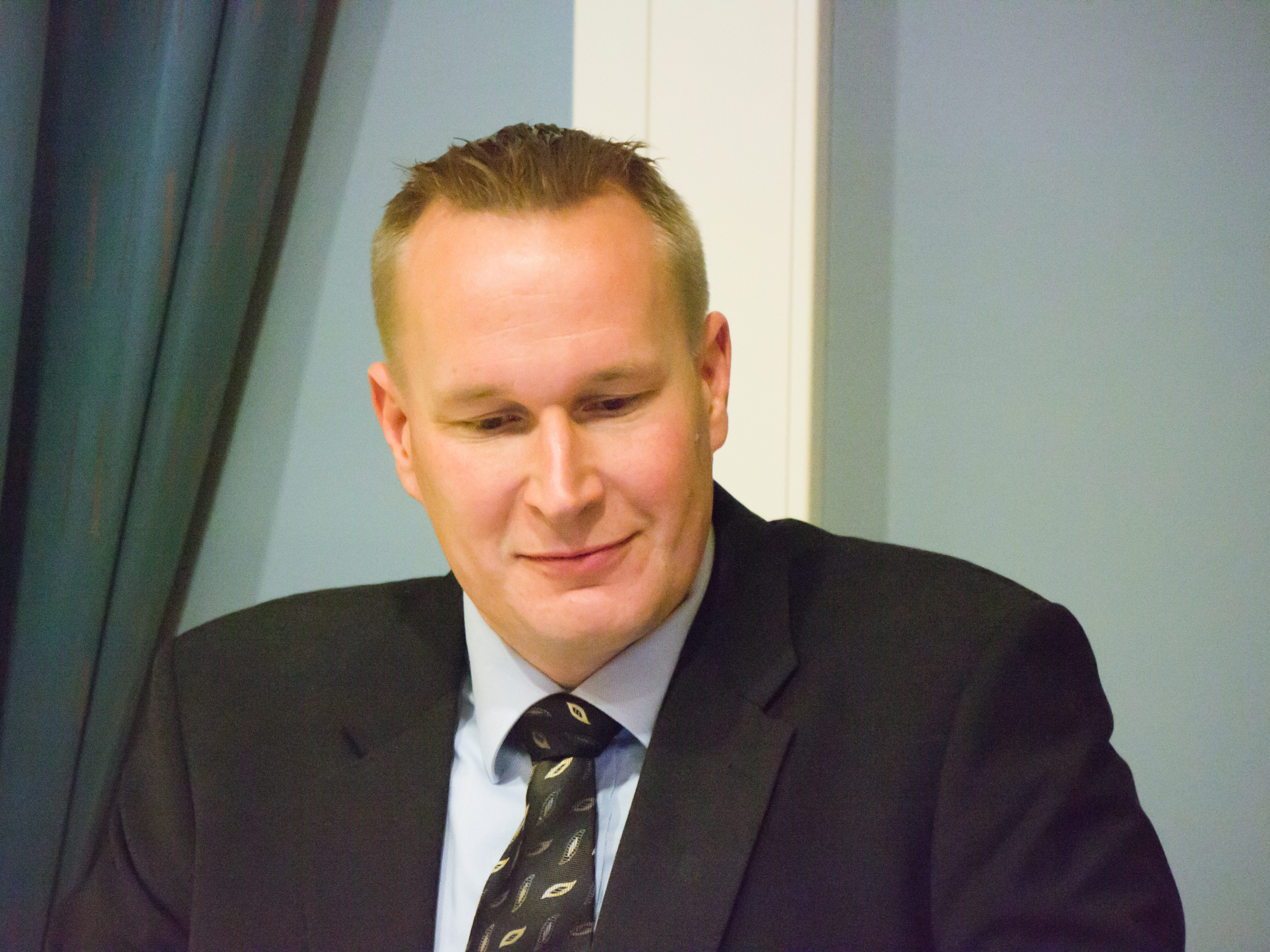 Markku Jokisipilä suomalainen historiantutkija ja valtiotieteen tohtori